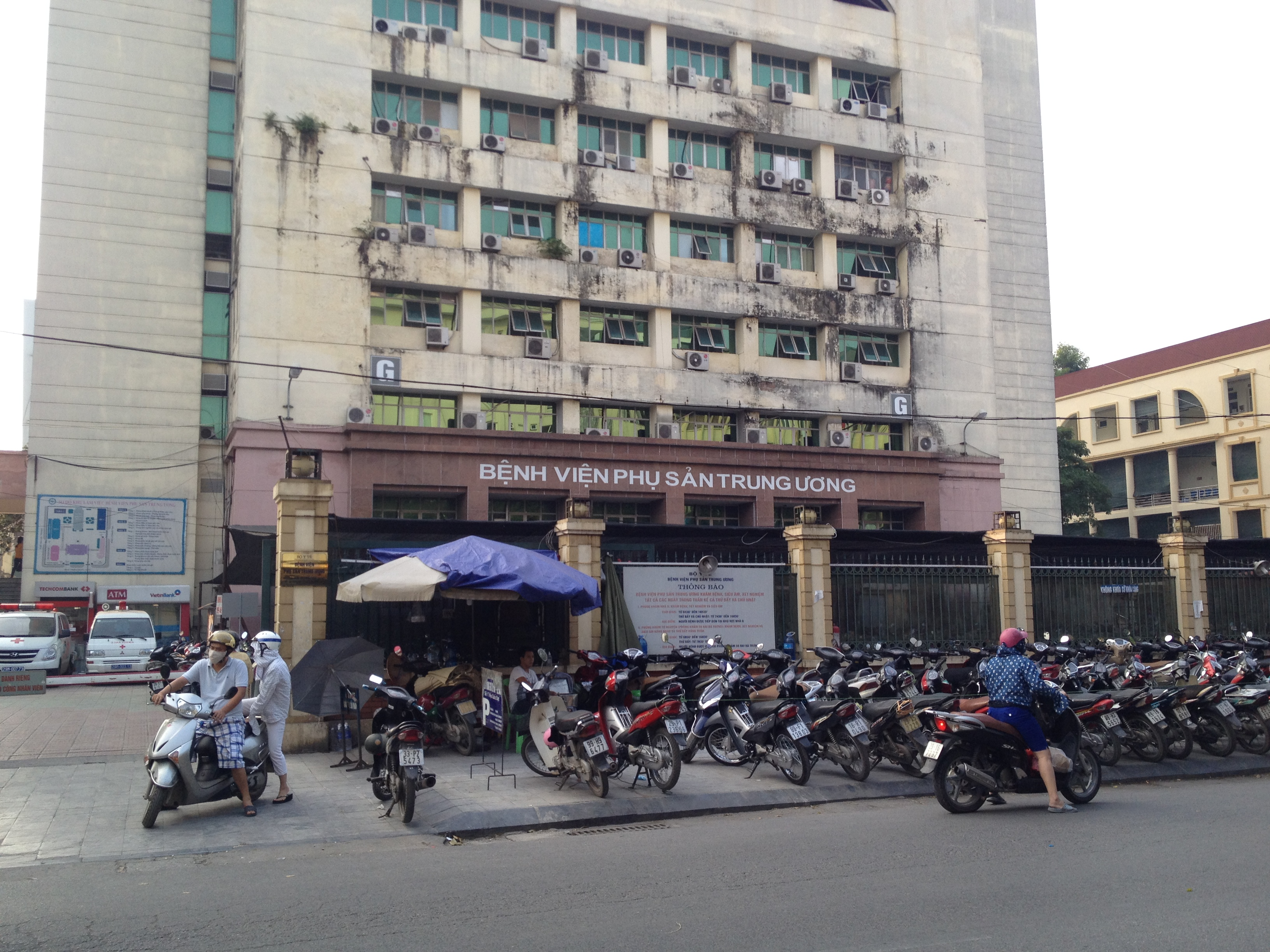 Hà Nội, Việt Nam.